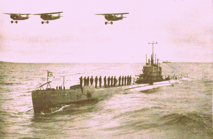 ARA S-2 and three Dewoitine D.21